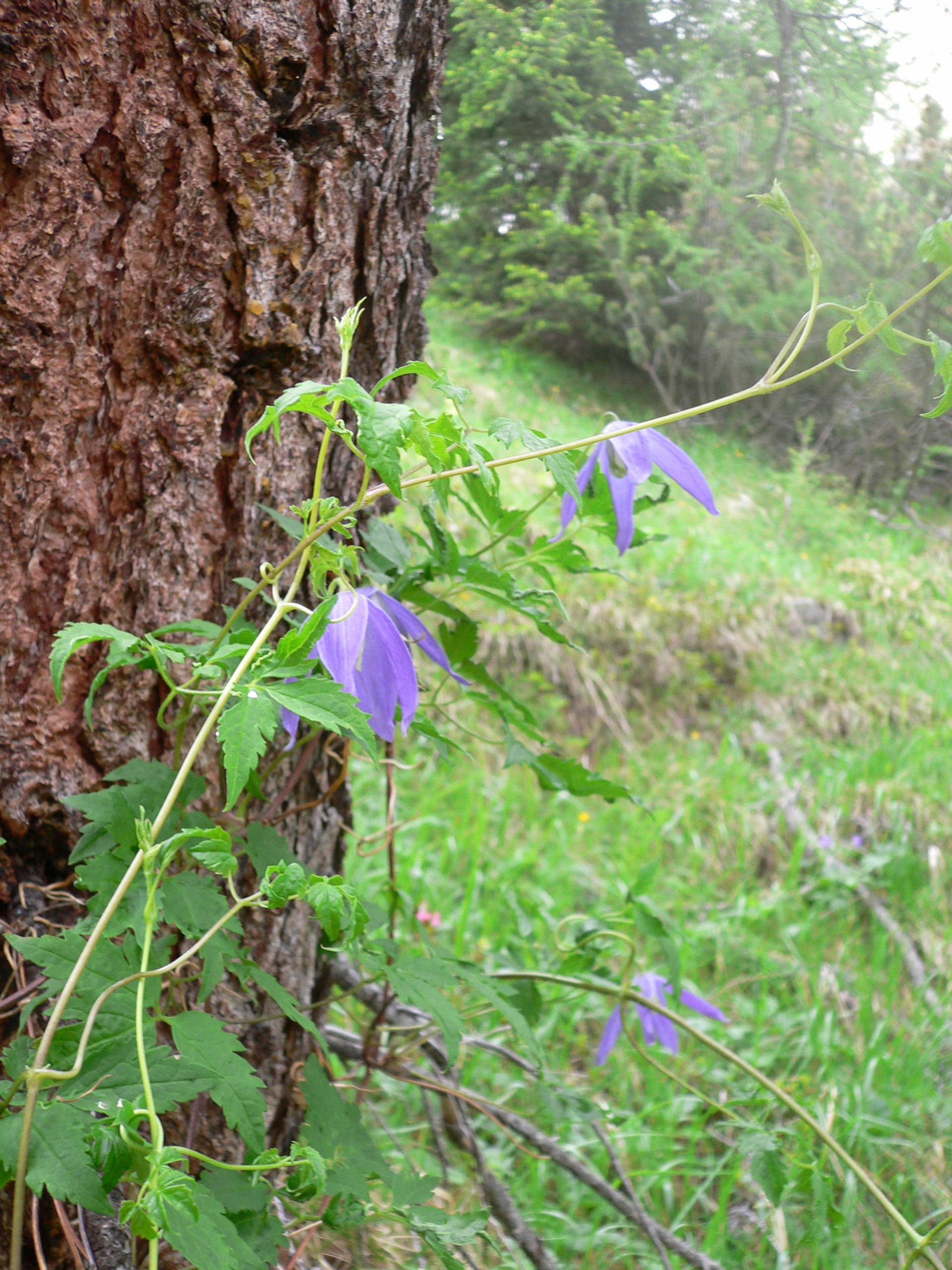 Clematis alpina fotografata in un bosco in Agordino (Belluno). Foto di Geremetta Moreno